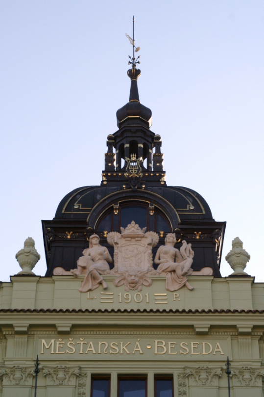 Detail průčelí s cibulovou střechou - Měšťanská beseda v Plzni.